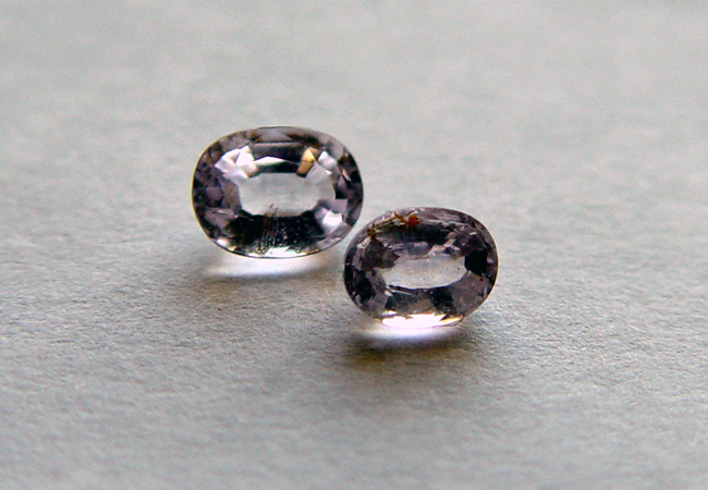 Facettierte Taaffeit-Kristalle, 0.47ct und 0.37ct, aus Tansania